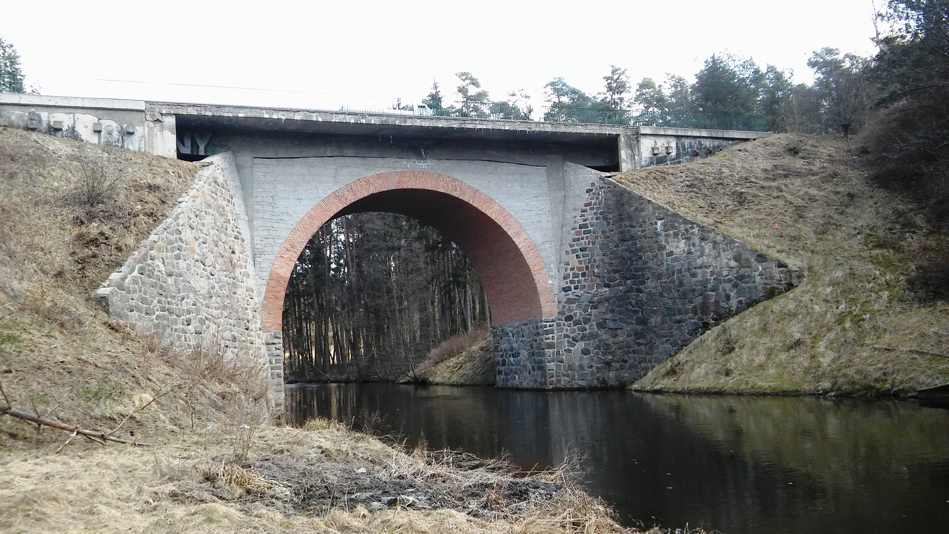 Most na rzece Wadąg, Dywity, droga krajowa nr 51.